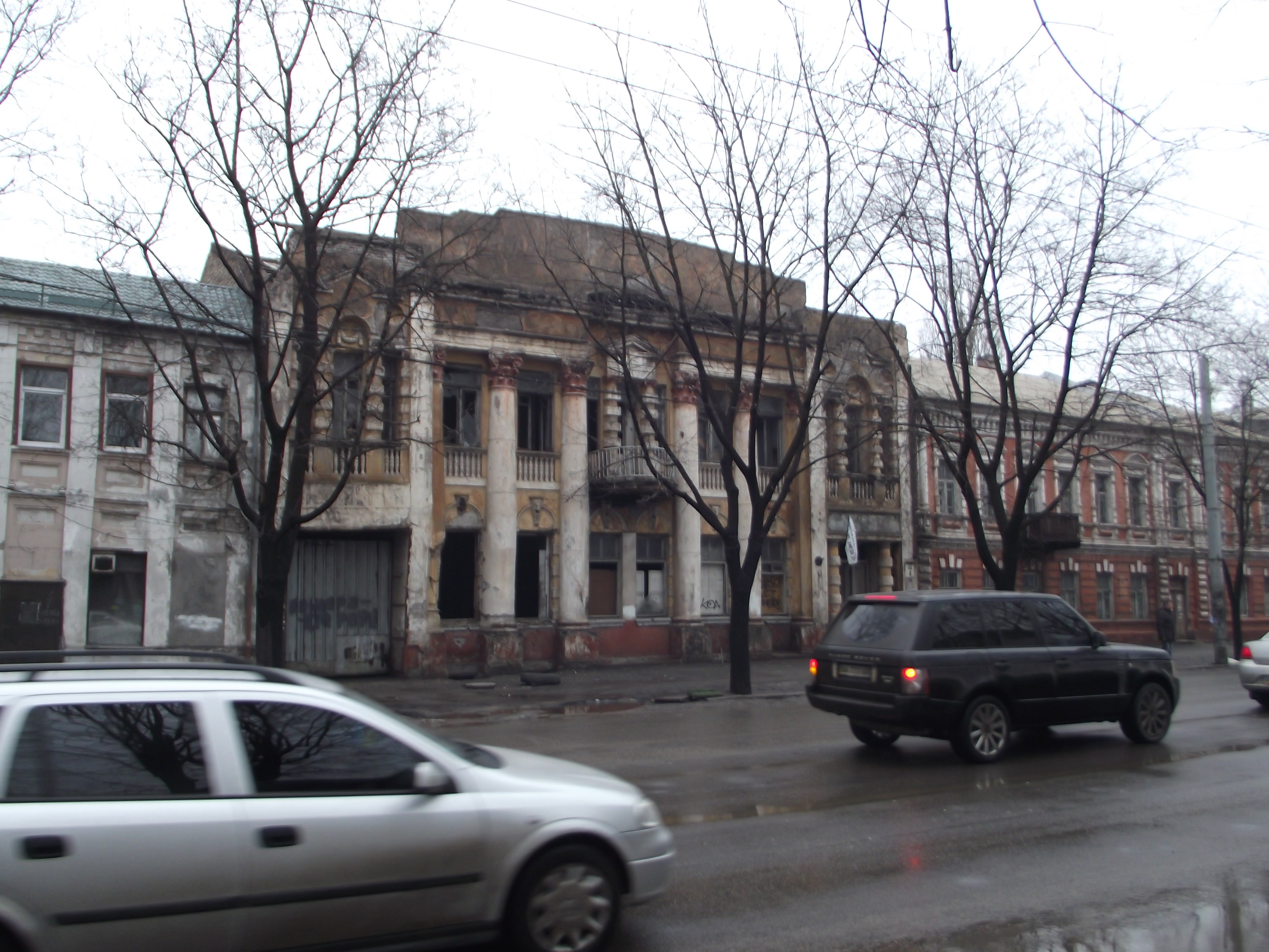 Житловий будинок та аптека Прицкера, Дніпропетровськ, Калініна просп., 4